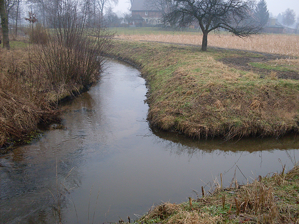 Mündung des Schwarzwasserbaches (rechts) in die Ems